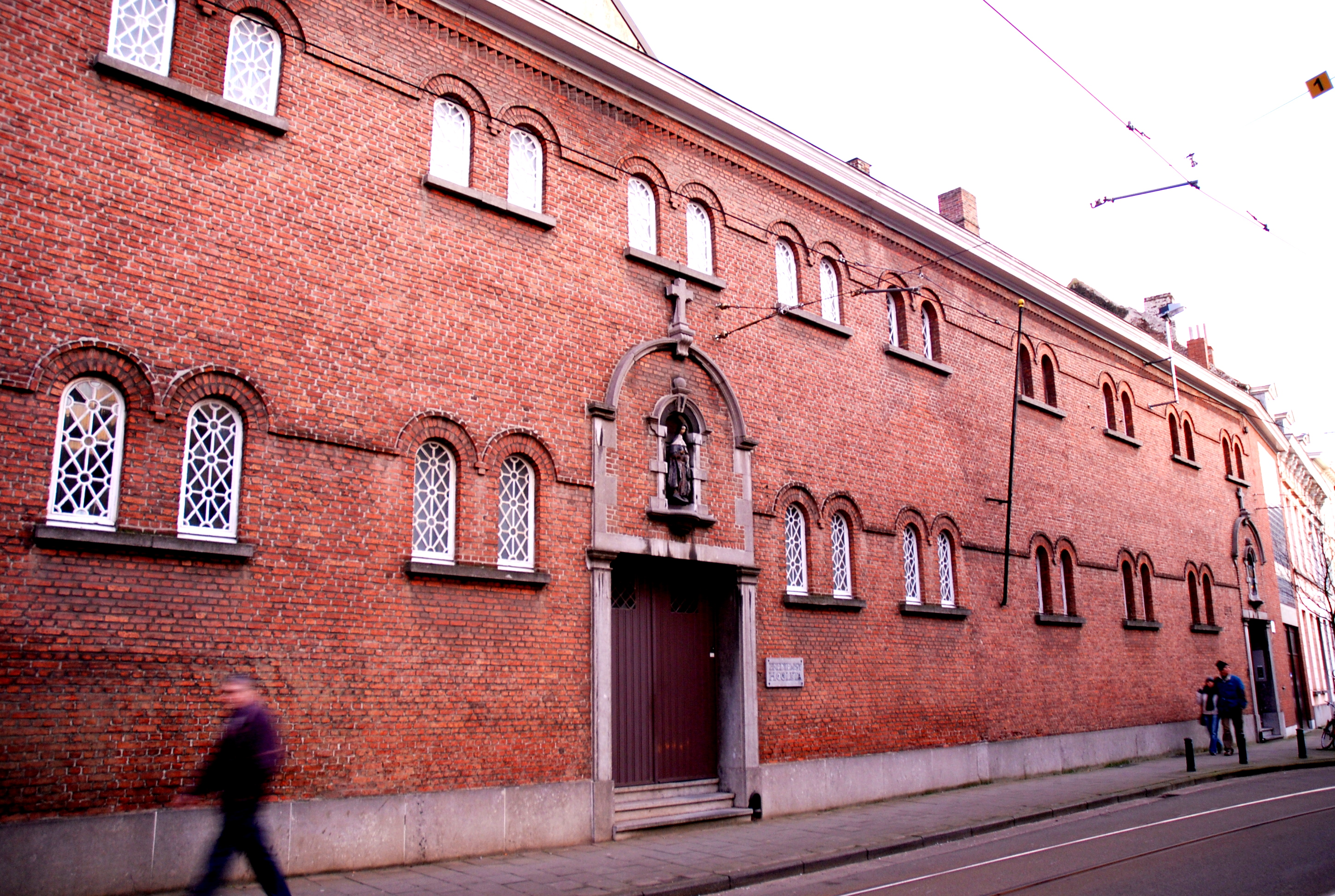 Het Monasterium Bethlehem of klooster van de Arme Klaren-Coletienen te Gent